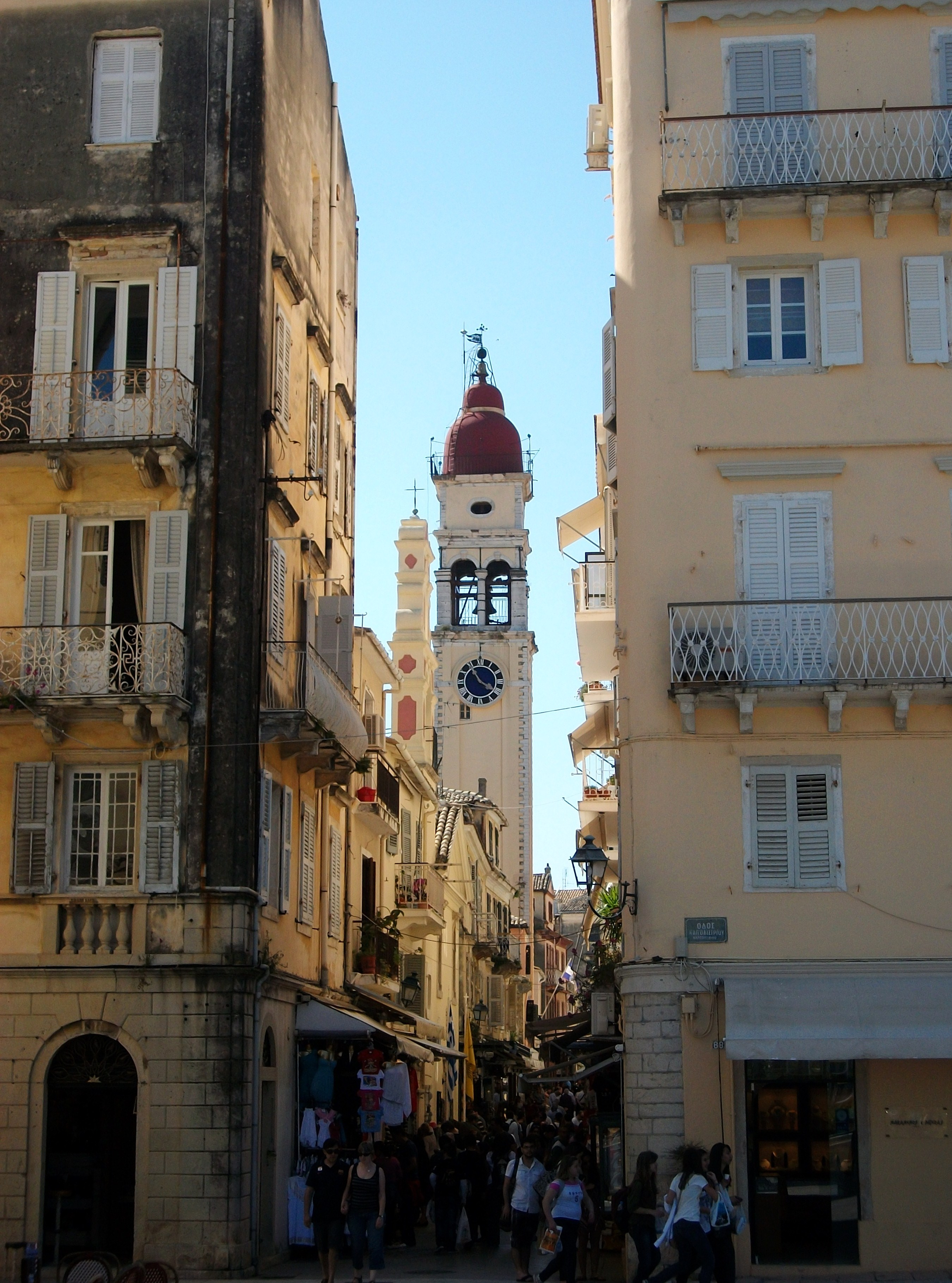 Carrer i campanar de l'església de sant Espiridó, Corfú.